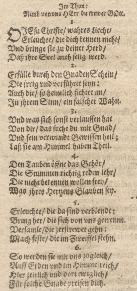 O Jesu Christe, wahres Licht, Druckfassung 1636